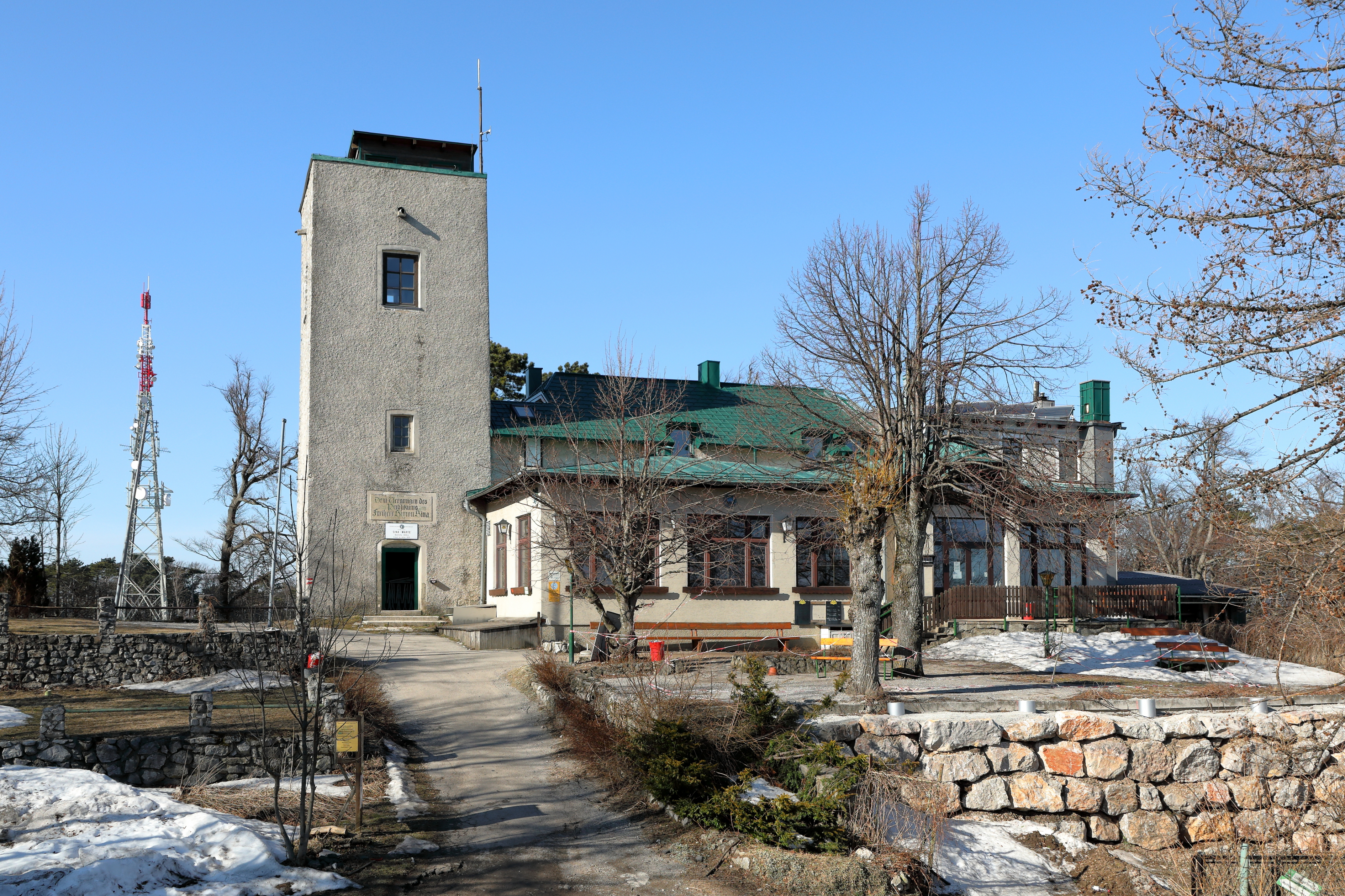 Die Sina-Warte und das angebaute Schutzhaus „Eisernes Tor“ auf dem Gipfel des 834 m hohen Hoher Lindkogel in der niederösterreichischen Gemeinde Alland und links im Hintergrund der ORS-Sender Raisenmarkt-Lindkogel.